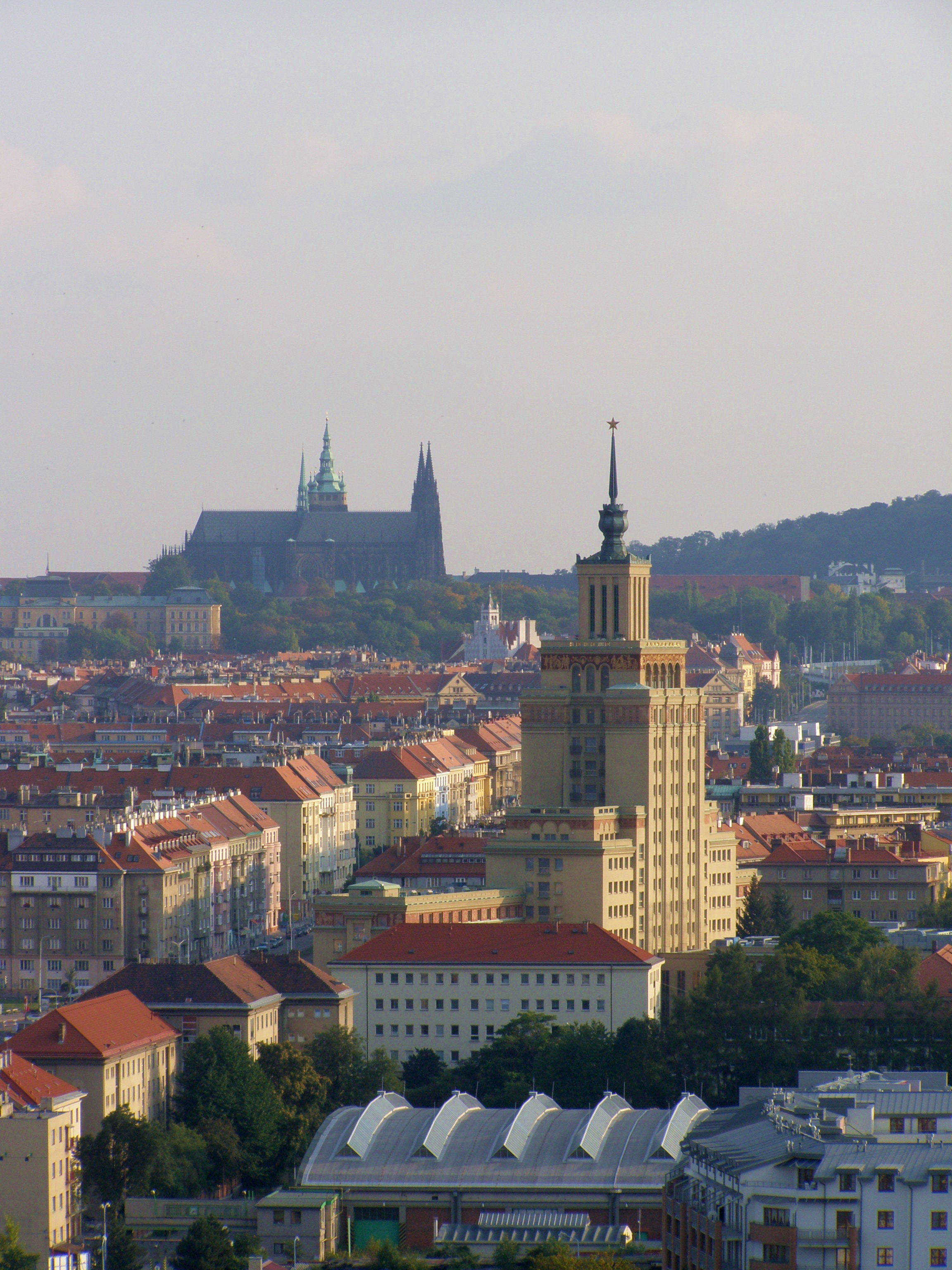 Praha, Dejvice, Hotel Crowne Plaza Prague, v pozadí Pražský hrad